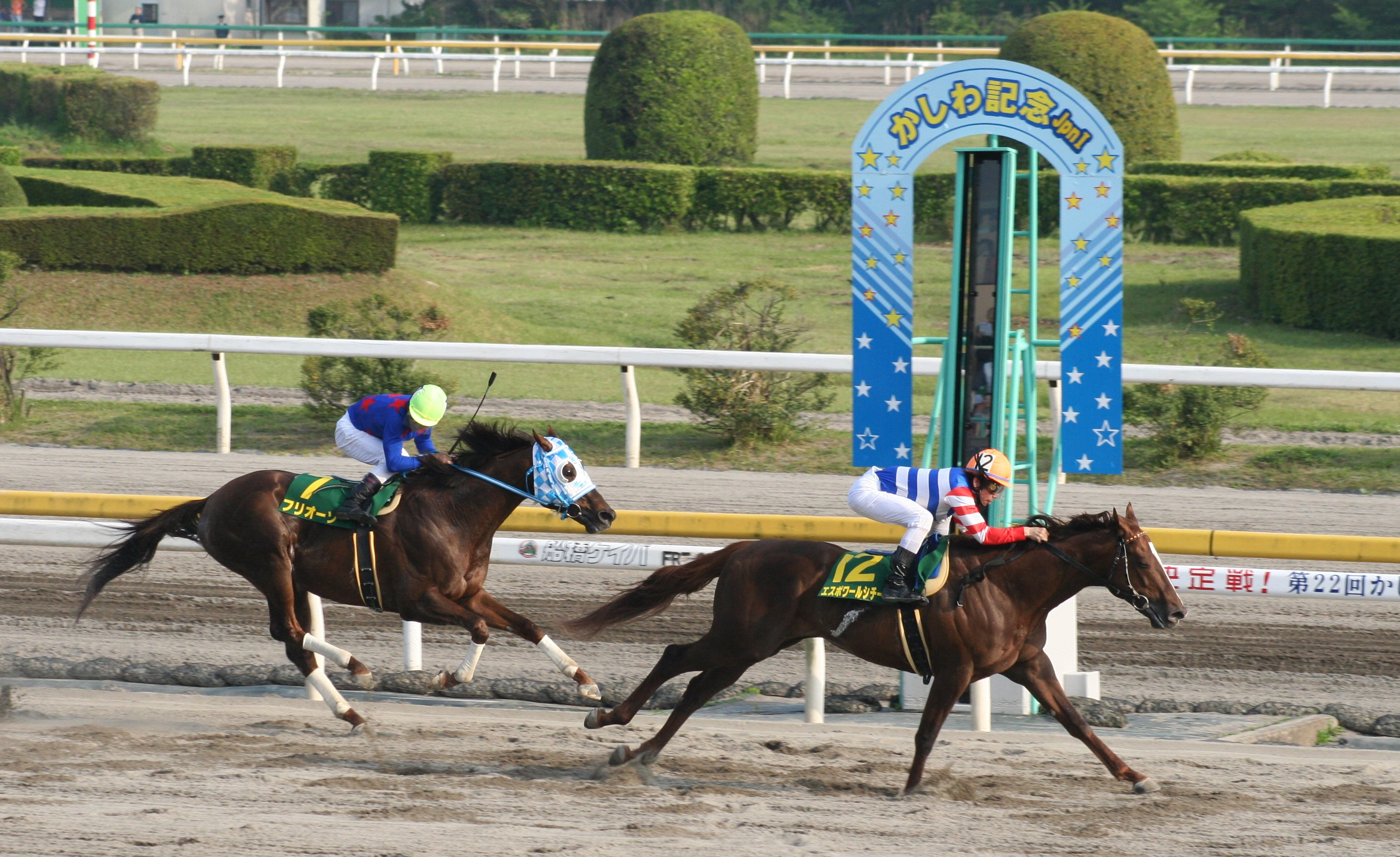 第22回かしわ記念（船橋競馬場）